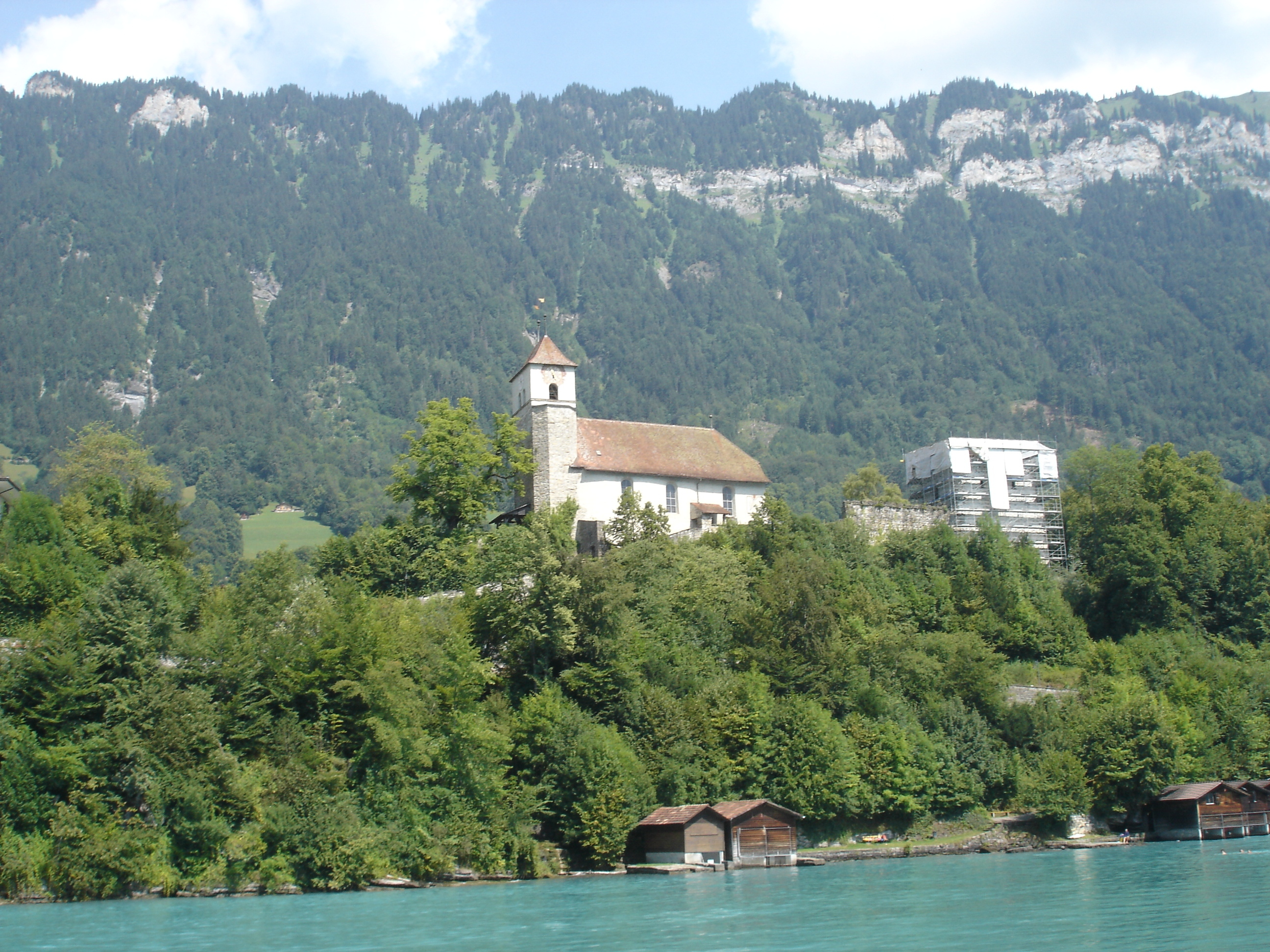 Burgkirche Ringgenberg